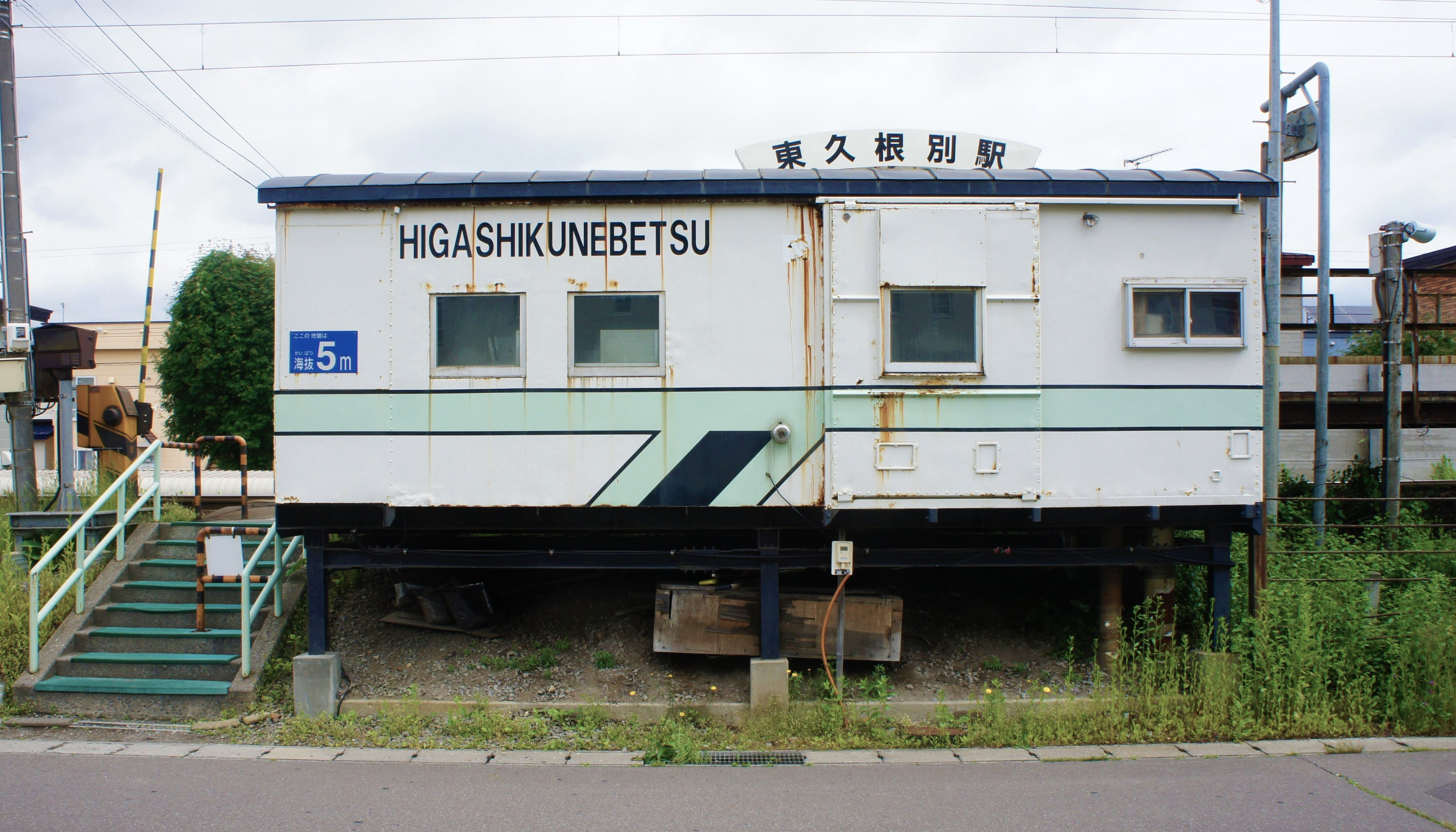 道南いさりび鉄道線・東久根別駅の駅舎